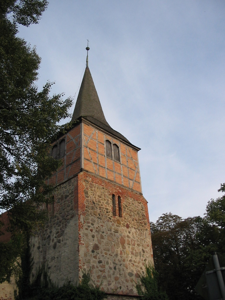 Die Kirche von Sietow-Dorf